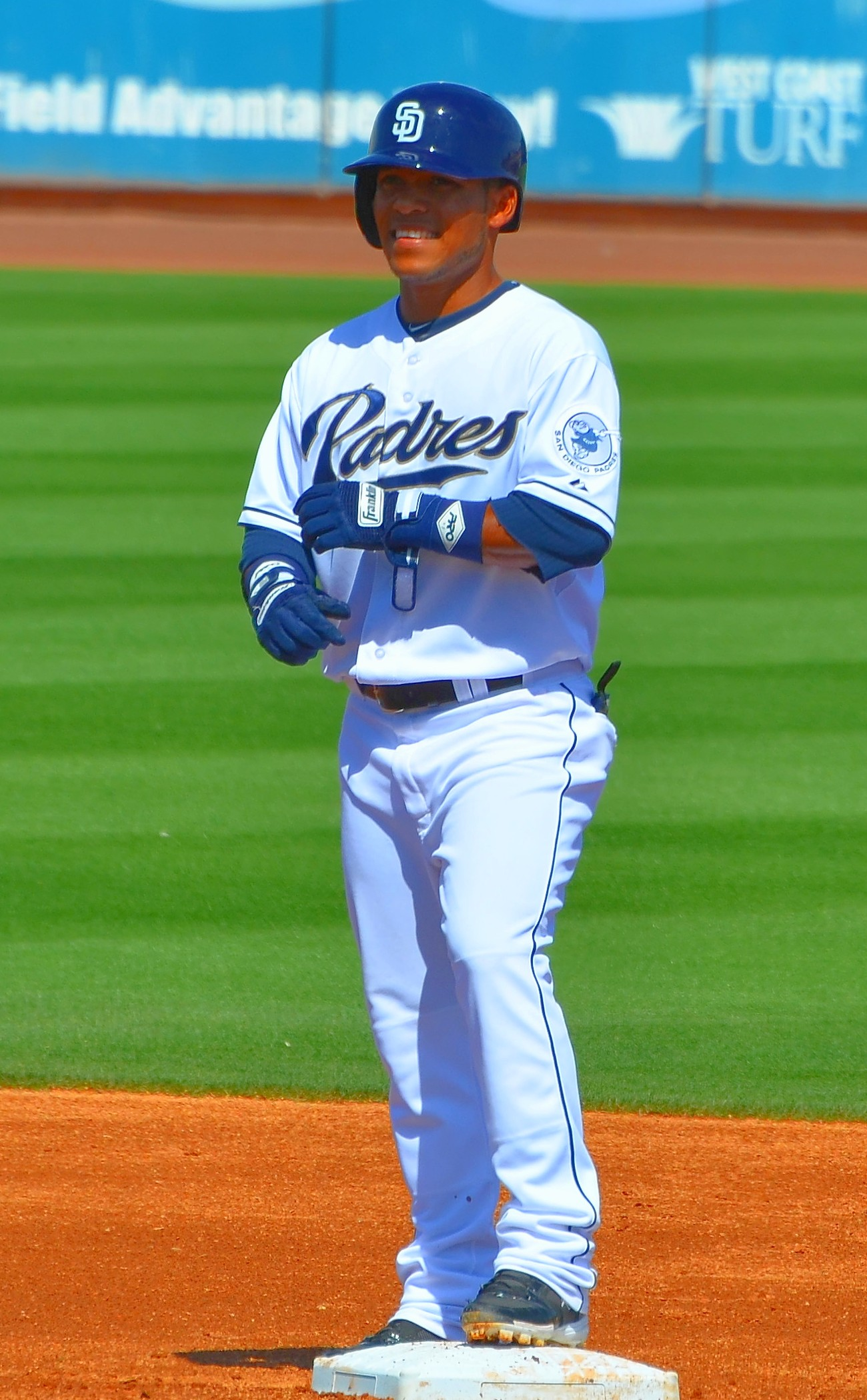 Alexi Amarista